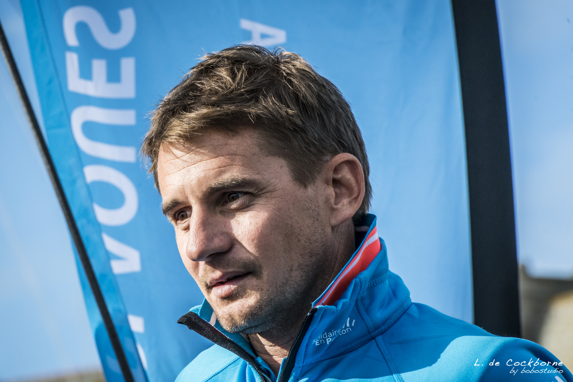 Thibaut VAUCHEL-CAMUS - Route du Rhum 2014